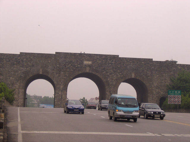 中山門 2004年撮影 撮影：本人